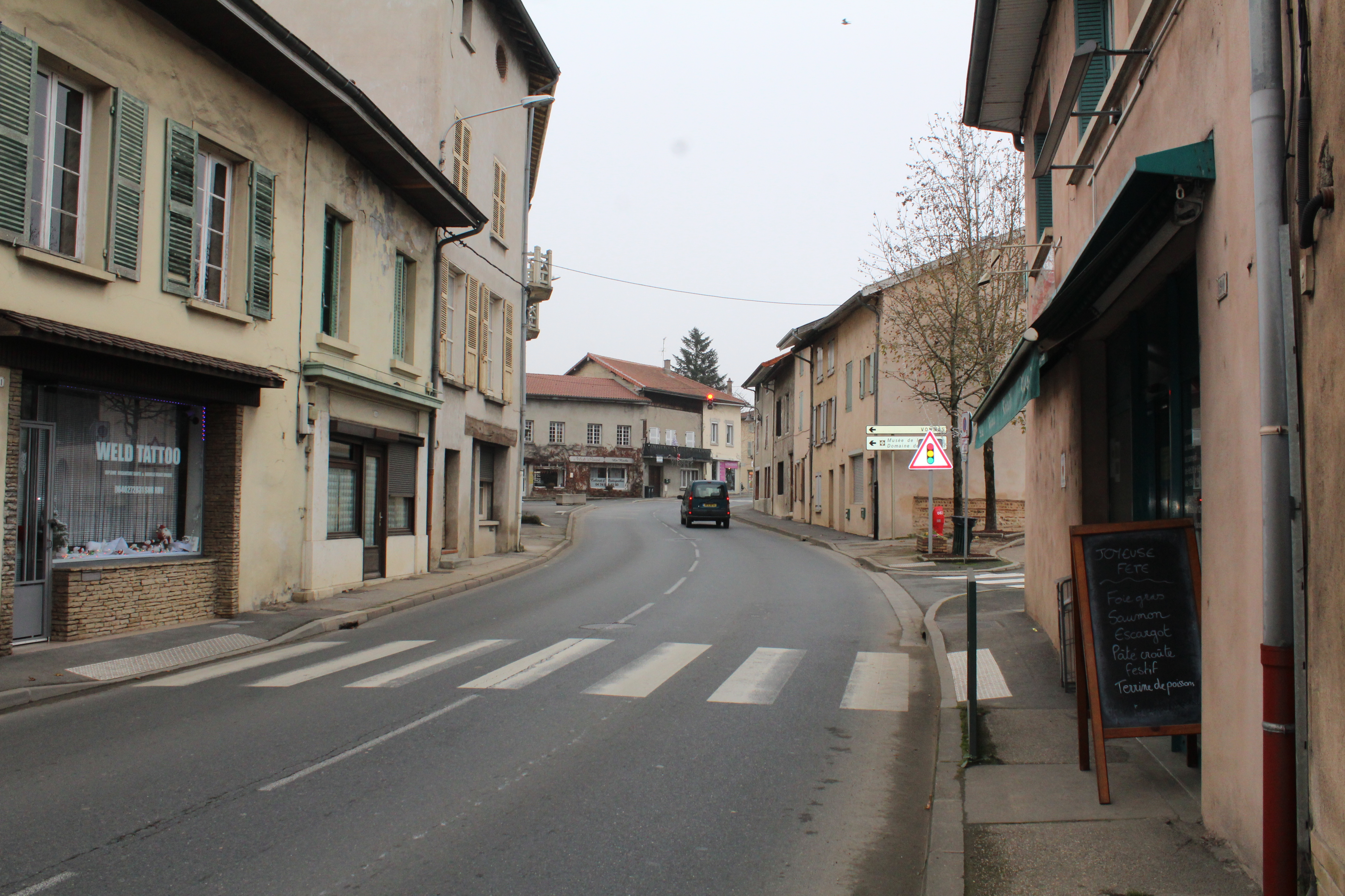 Vue sur la grande rue de Neuville-les-Dames en direction de Bourg-en-Bresse.